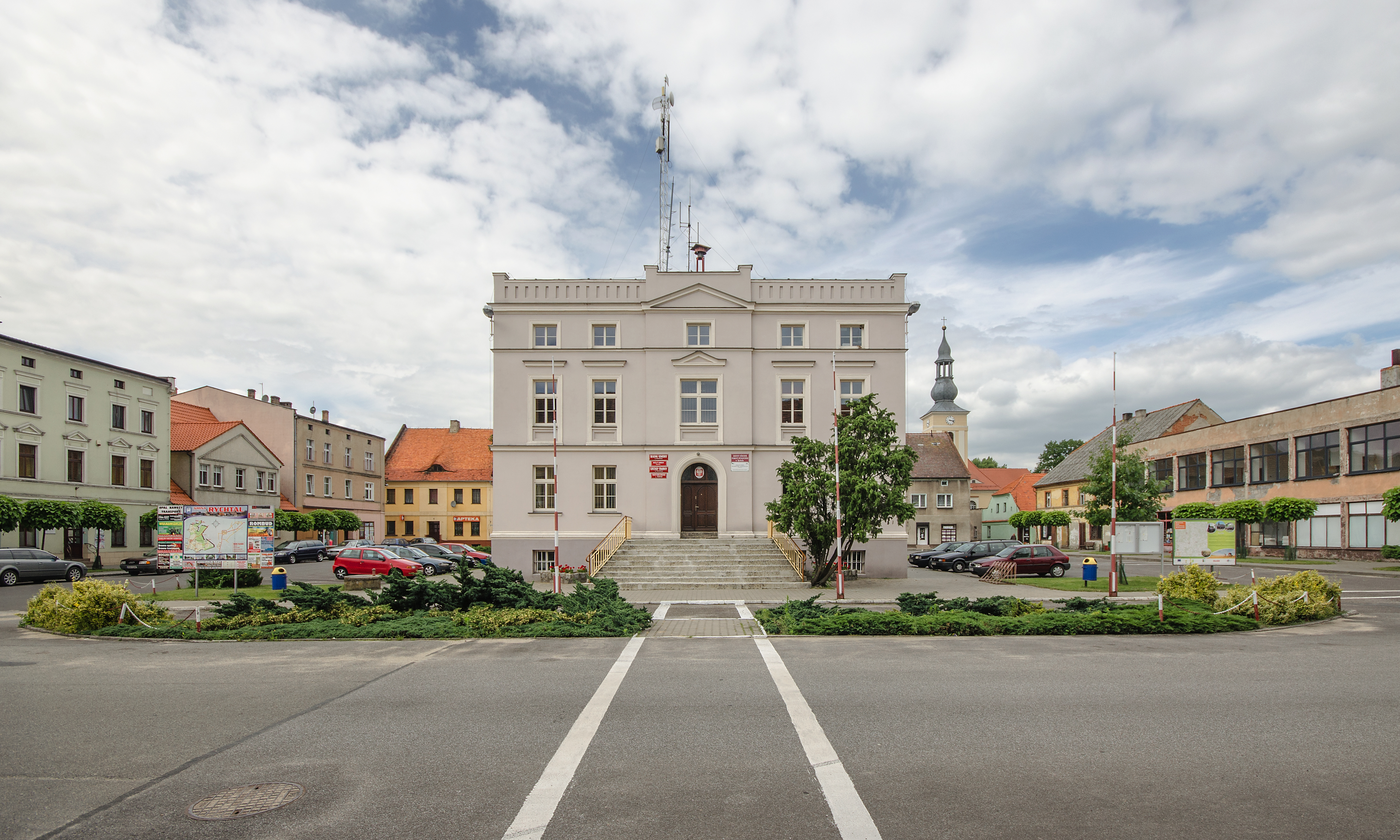 Ratusz w Rychtalu